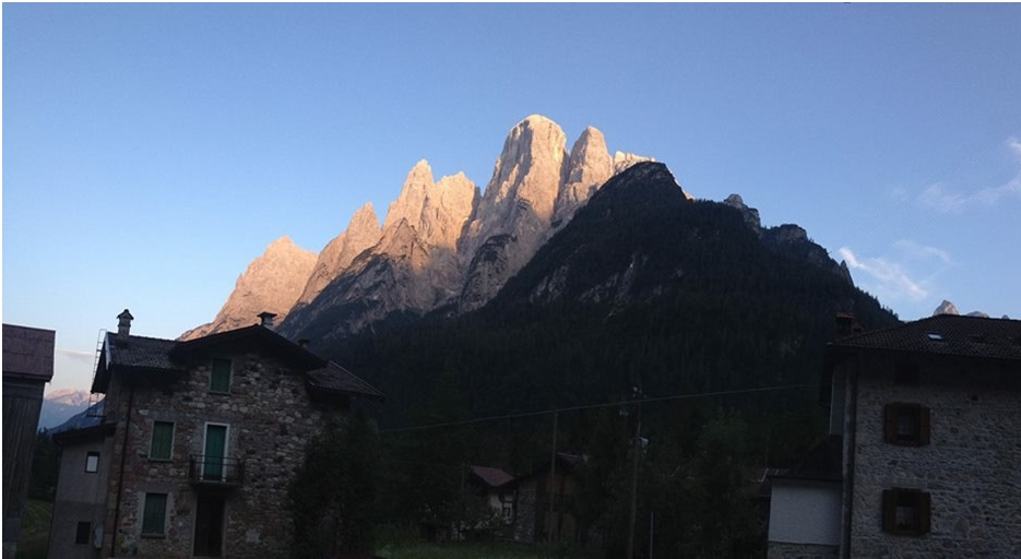 Agner